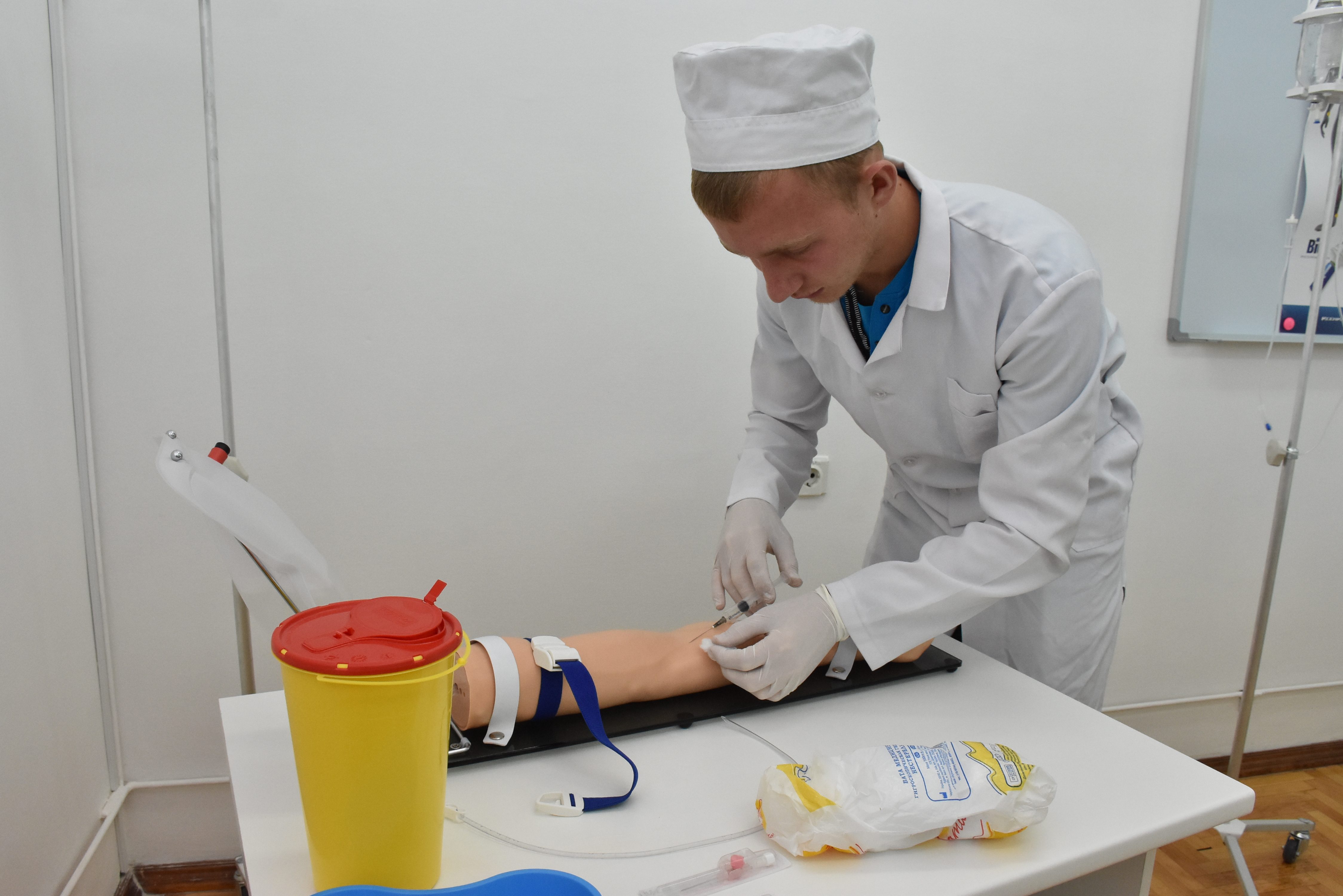 Студенти на заняттях у центрі симуляційного навчання Тернопільського державного медичного університету імені І. Я. Горбачевського.